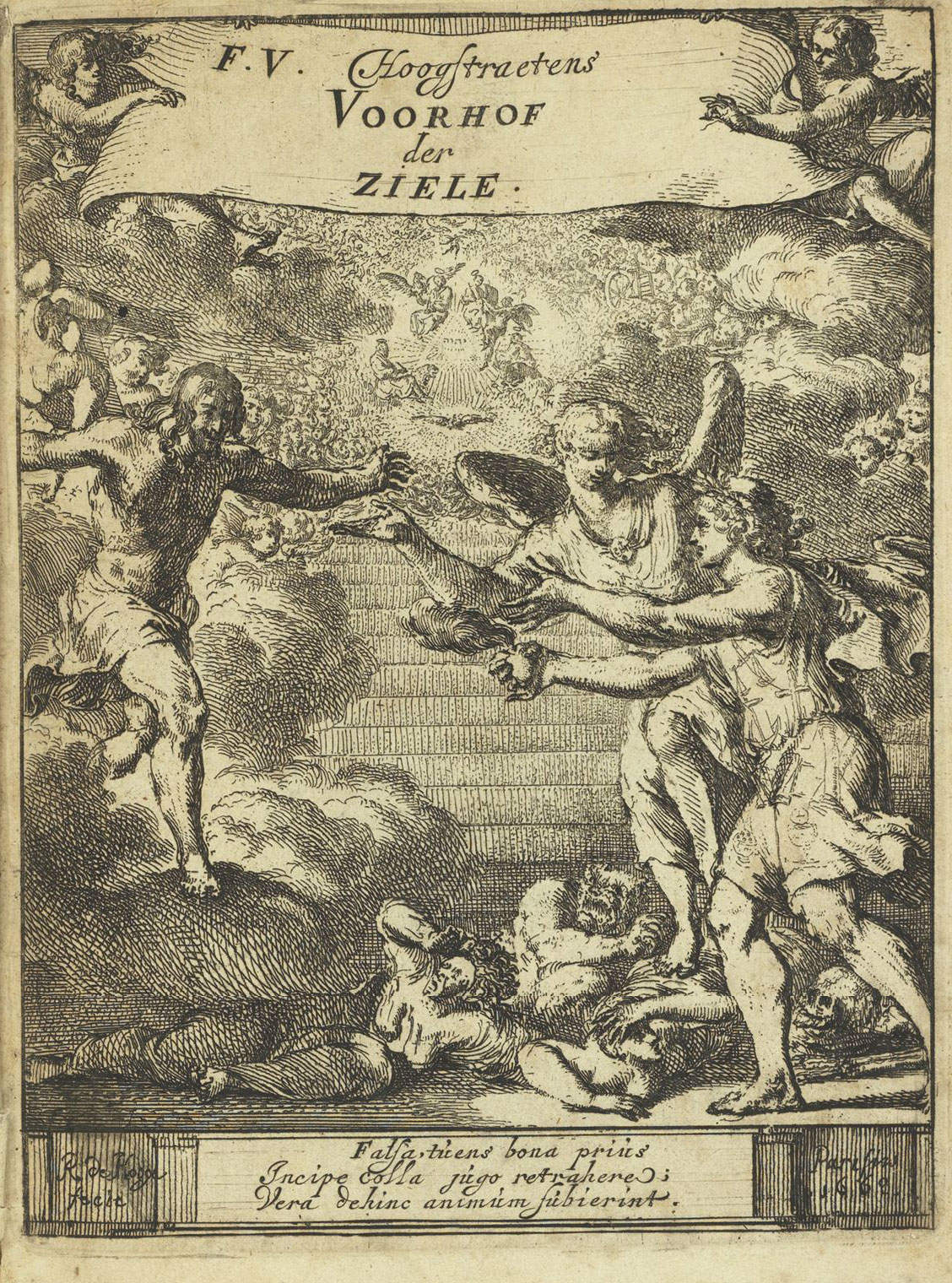 Titelblad "Voorhof der Ziele", auteur François van Hoogstraten (1632-1696)